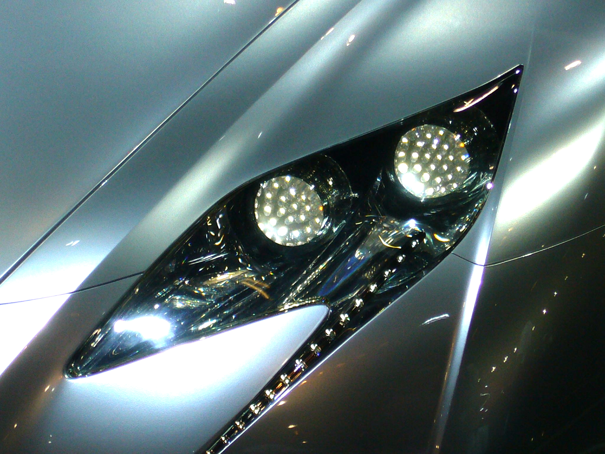 LF-A